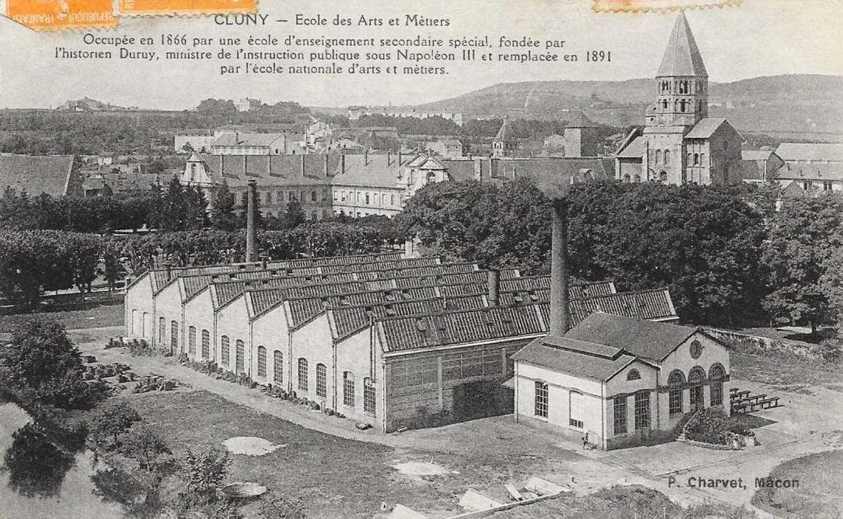 École d'enseignement spécial de Cluny, fondée en 1866 par Victor Duruy.